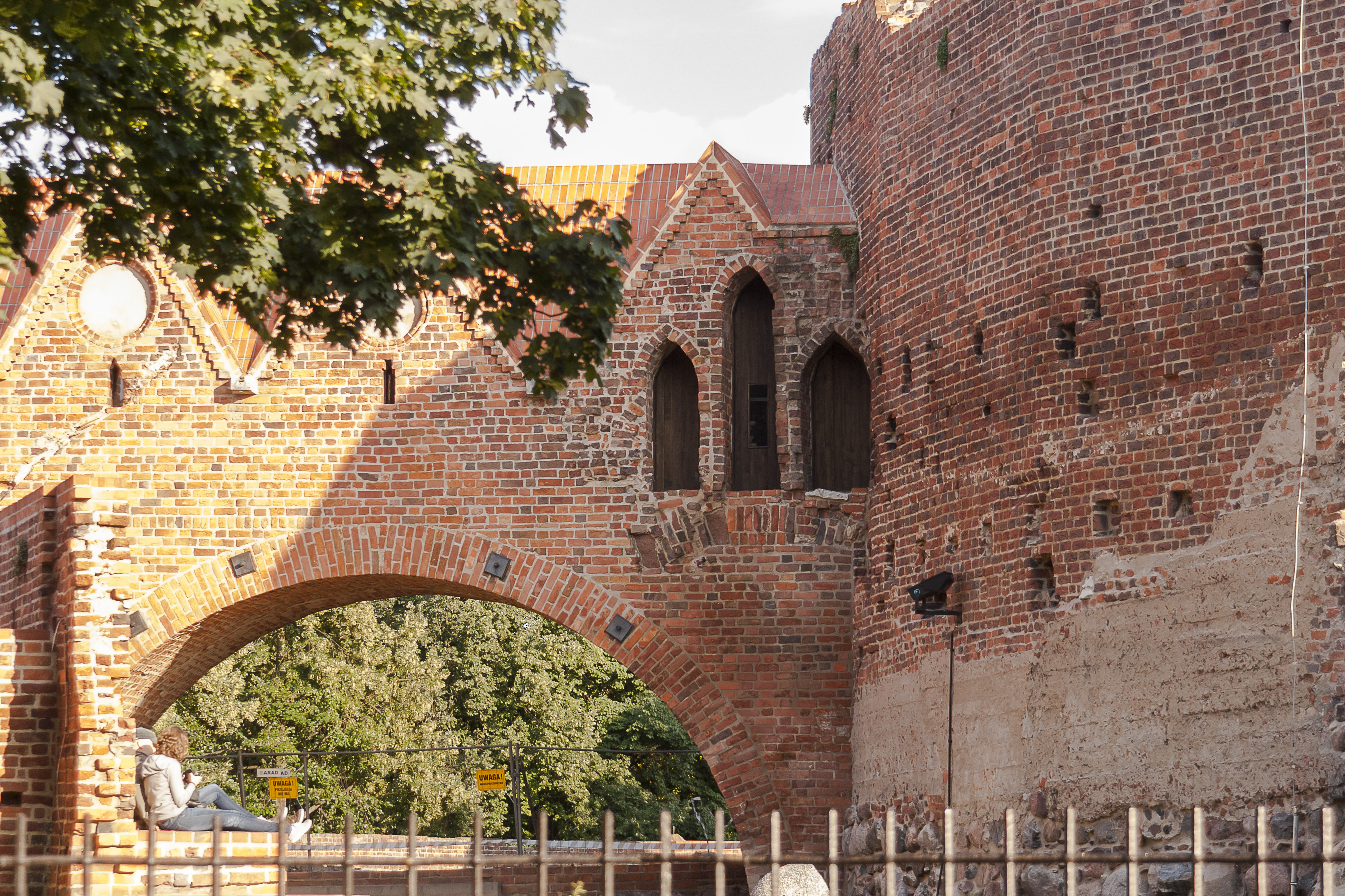 Ruiny zamku krzyżackiego